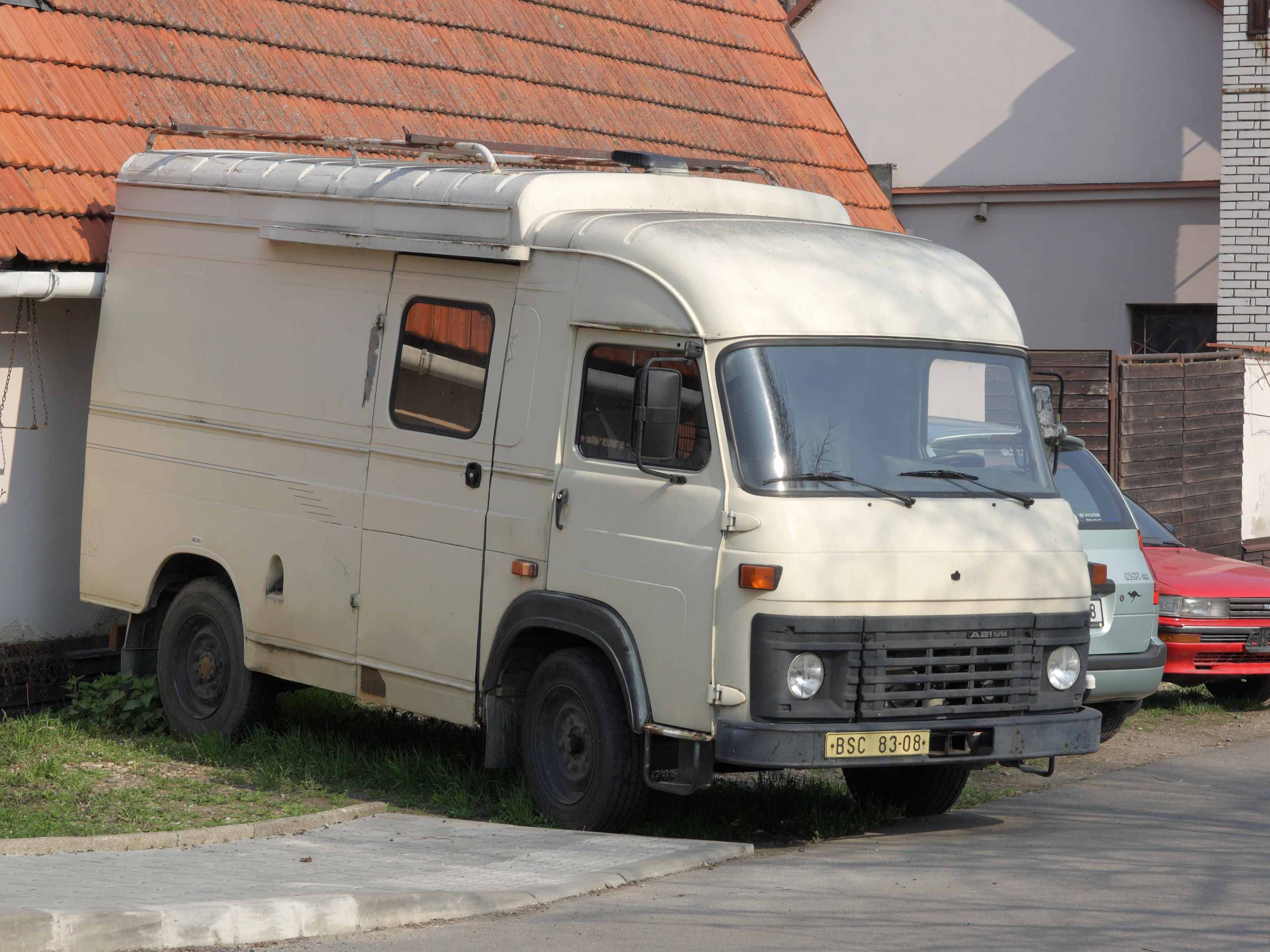 Bílá dodávka Avia A21 Turbo.